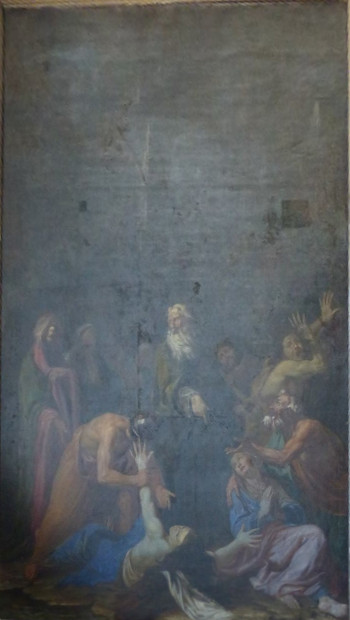 Tableau de Marc Chabry (1660-1727) représentant deux philosophes surpris de voir la puissance de saint Antoine sur les possédés